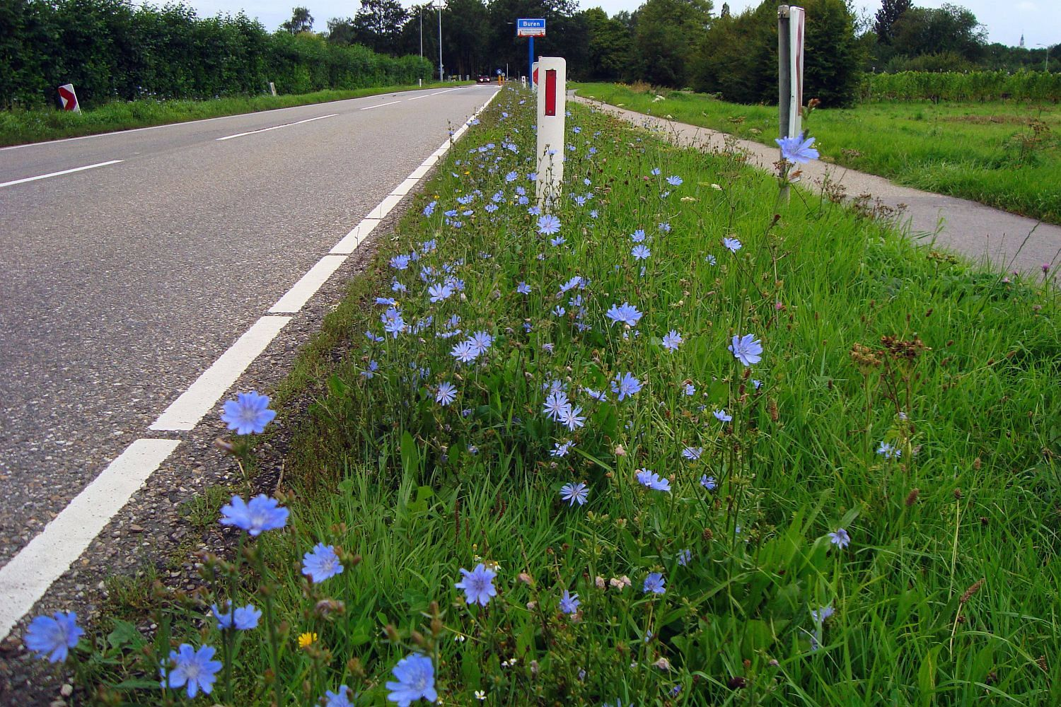 wegenwachter of wilde cichorei - common chicory - gemeine Wegwachter - Cichorium intybus